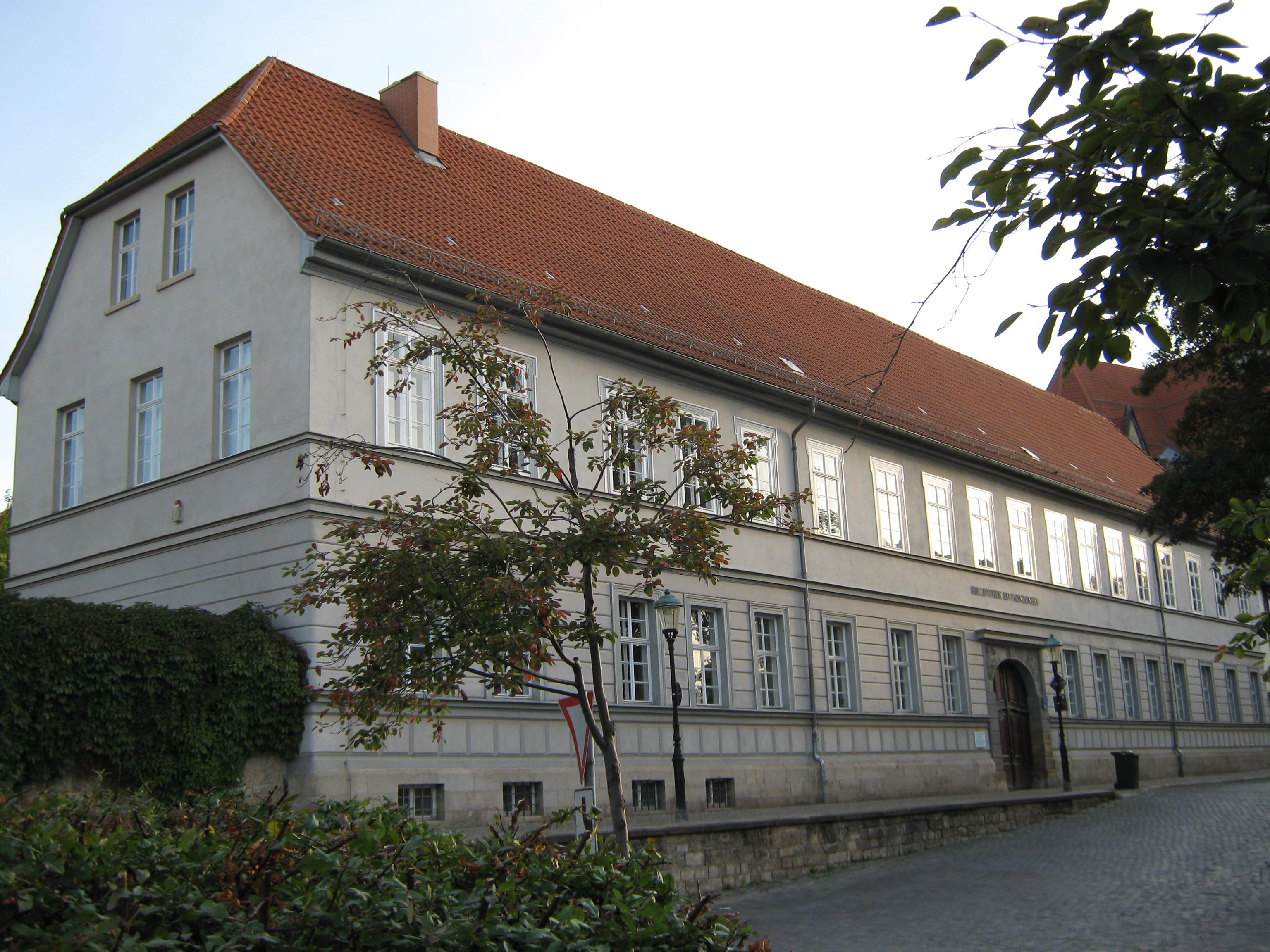 Der Prinzenhof in Arnstadt: früher Benediktinerinnenkloster, Wohnpalais für Prinzen, dann Gymnasium, heute Stadtbibliothek.